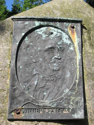 Willibald Alexis, Denkmal in Kloster Lehnin, Ortsteil Lehnin, Brandenburg